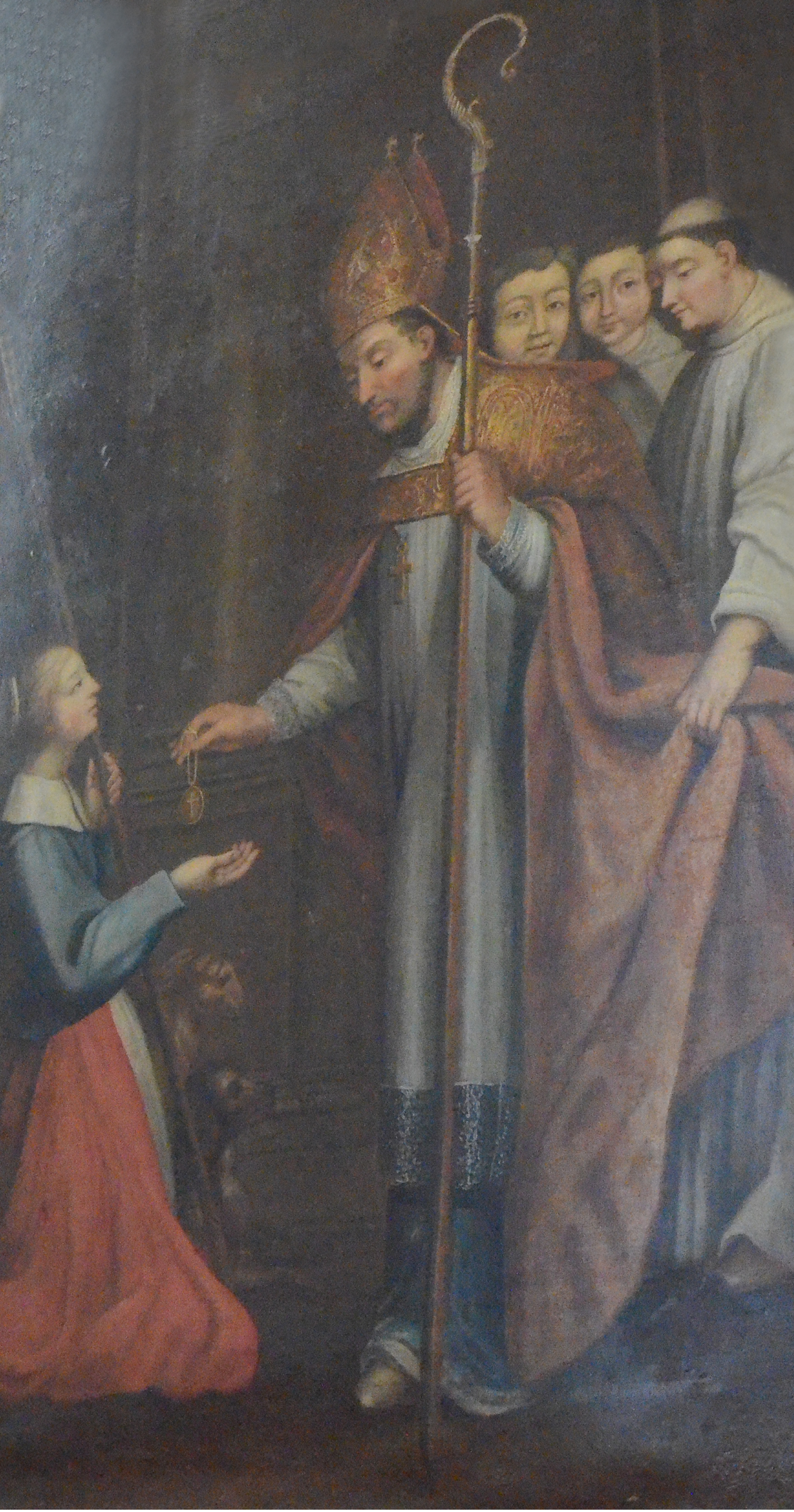 Tableau représentant Saint-Germain d'Auxerre, patron du diocèse de Rimouski, et sainte Geneviève de Paris. Le tableau a été commandé en 1736 et réalisé par un artiste inconnu. Voir Contribution à l'iconographie de Saint-Germain, p. 390.